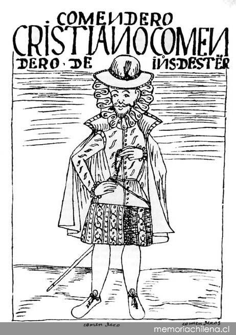 Nueva crónica y buen gobierno / Felipe Guamán Poma de Ayala ; transcripción, prólogo, notas y cronología Franklin Pease. Caracas : Biblioteca Ayacucho, impresión de 1980. 2 volúmenes